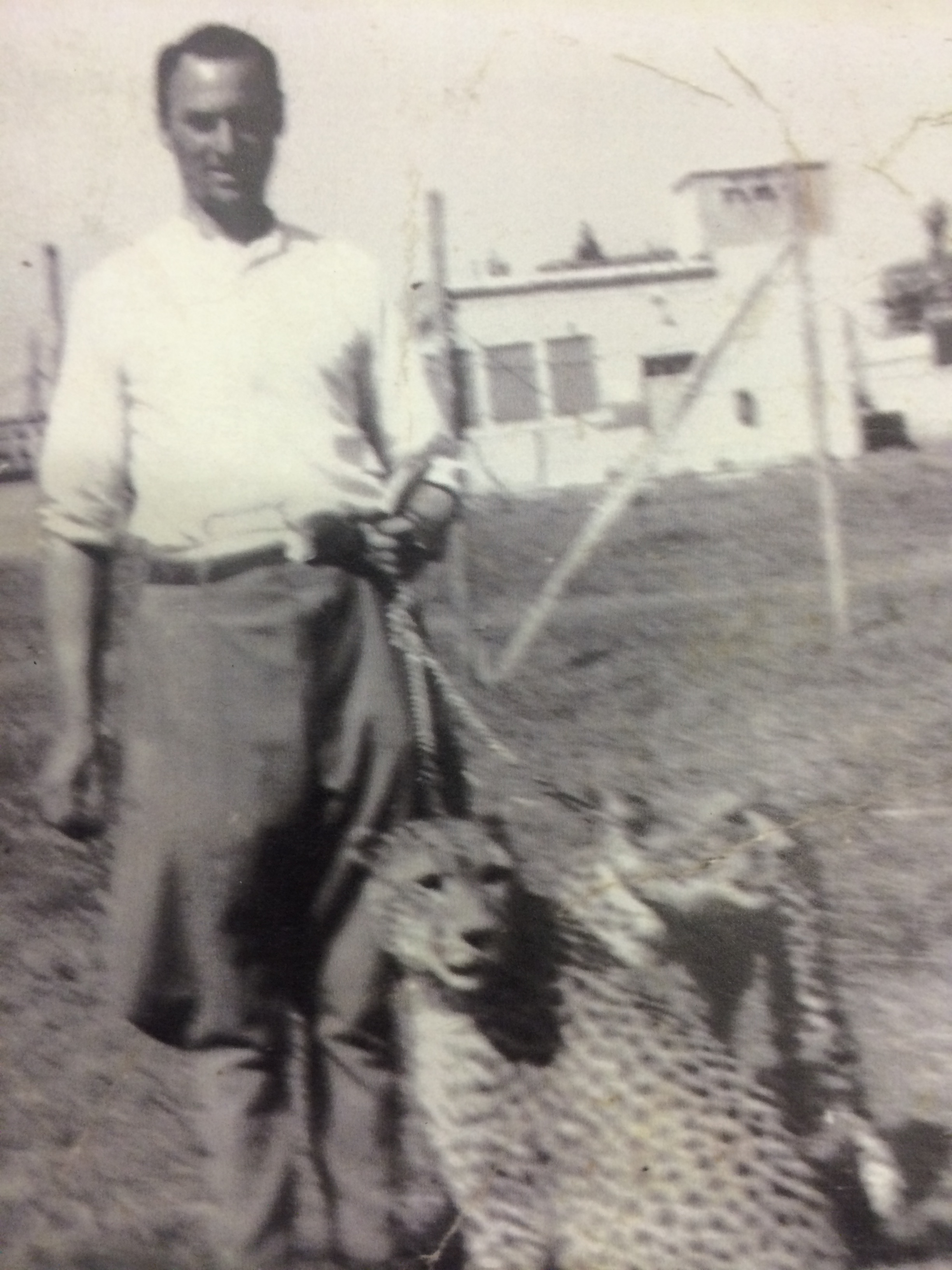 Carlo Stevens in 1950.